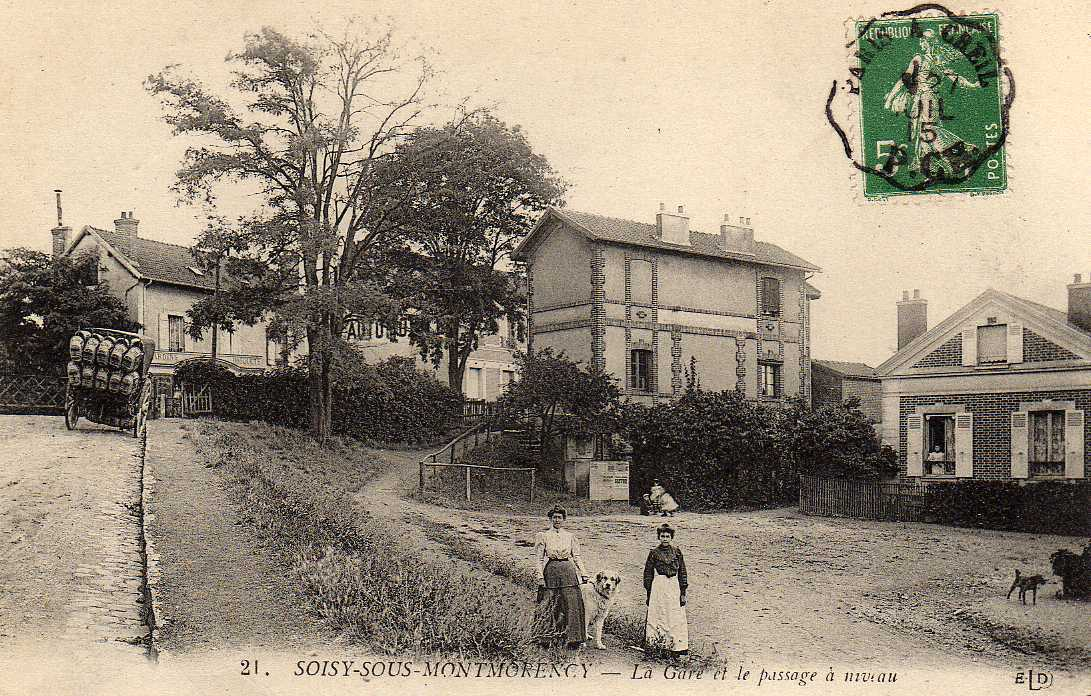 Soisy-sous-Montmorency : la gare et le passage à niveau en 1915 (ligne disparue du Refoulons)